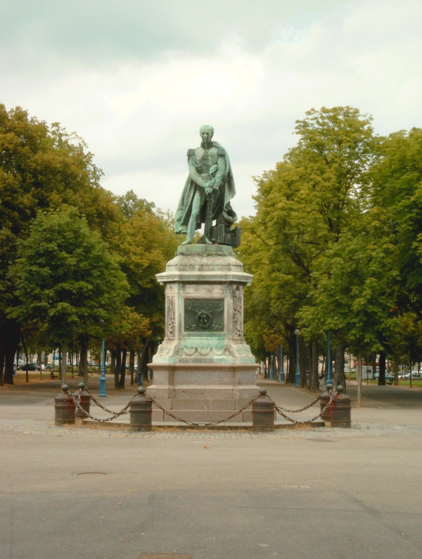 Statut du Général Drouot à Nancy, cours Léopold. Statue de David d'Angers, tête sculptée par Giorné Viard. Trois bas-reliefs rapportent des scènes de sa vie : porté en triomphe par ses camarades après son examen d'entrée à l'école d'artillerie ; ouverture à Hanau d'un passage à travers les Bavarois ; vieillard malvoyant, se consacrant aux oeuvres de charité.